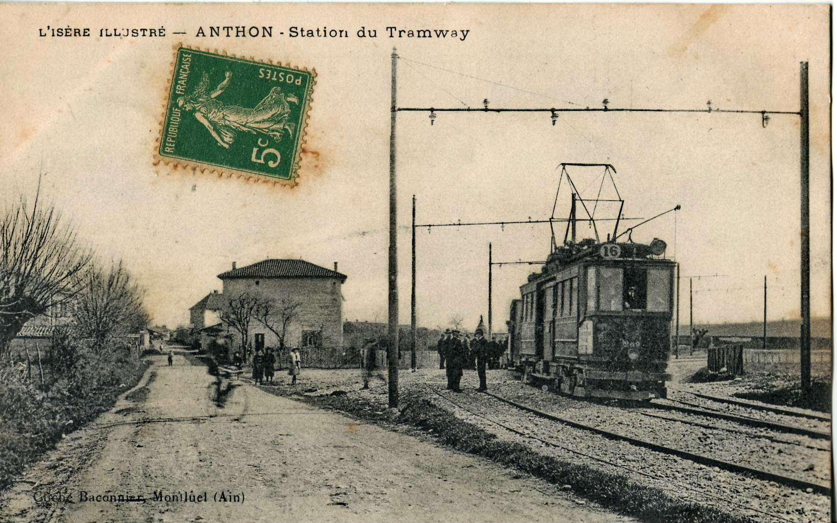 Carte postale ancienne éditée par Baconnier à Montluel, collection l'Isère illustré : ANTHON - Station du Tramway. Ligne 16 de l'OTL